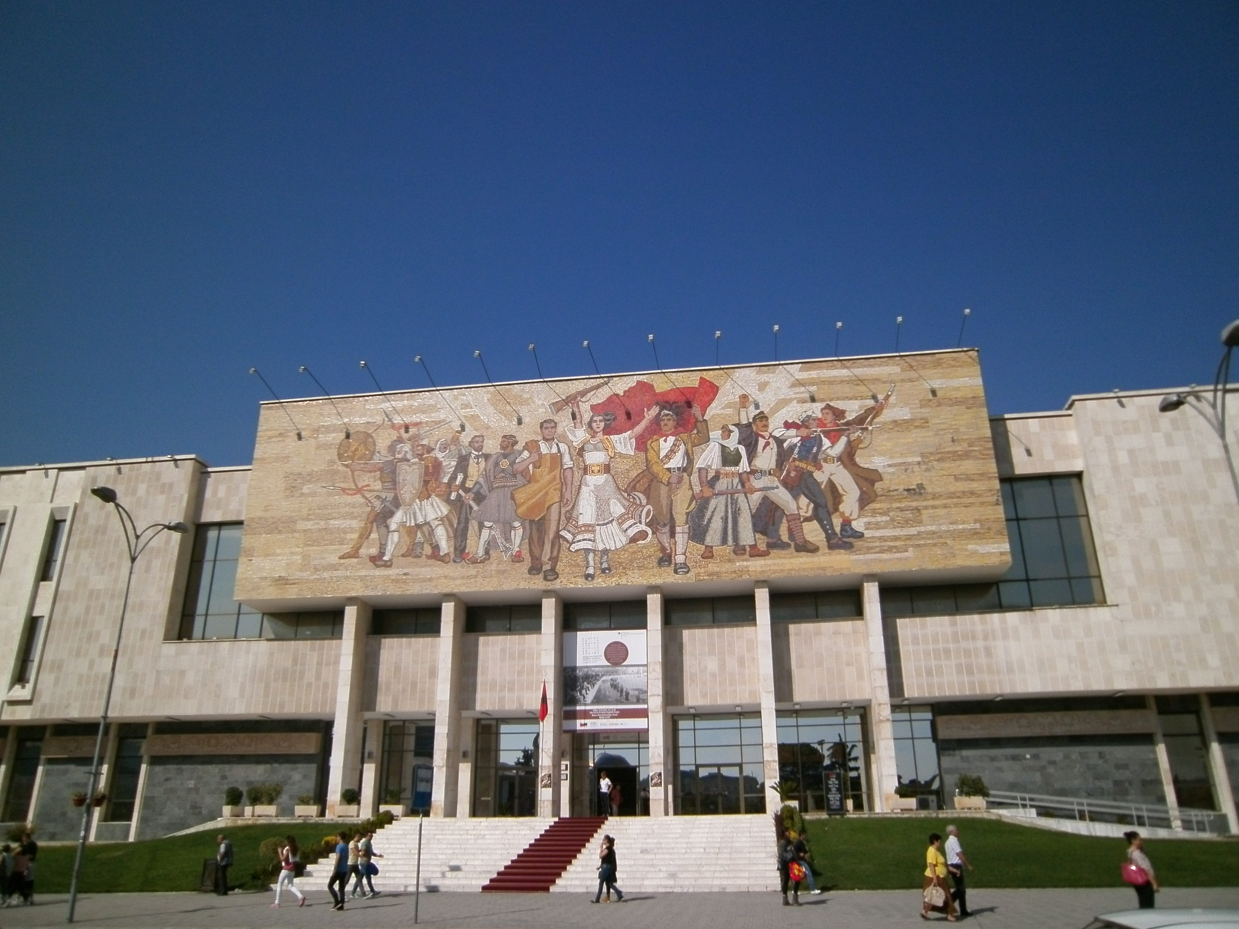 Muzeu Historik Kombëtar. Pamje ballore nga sheshi. Mund te shihet qartesisht mozaiku dhe hyrja kryesore e muzeut.